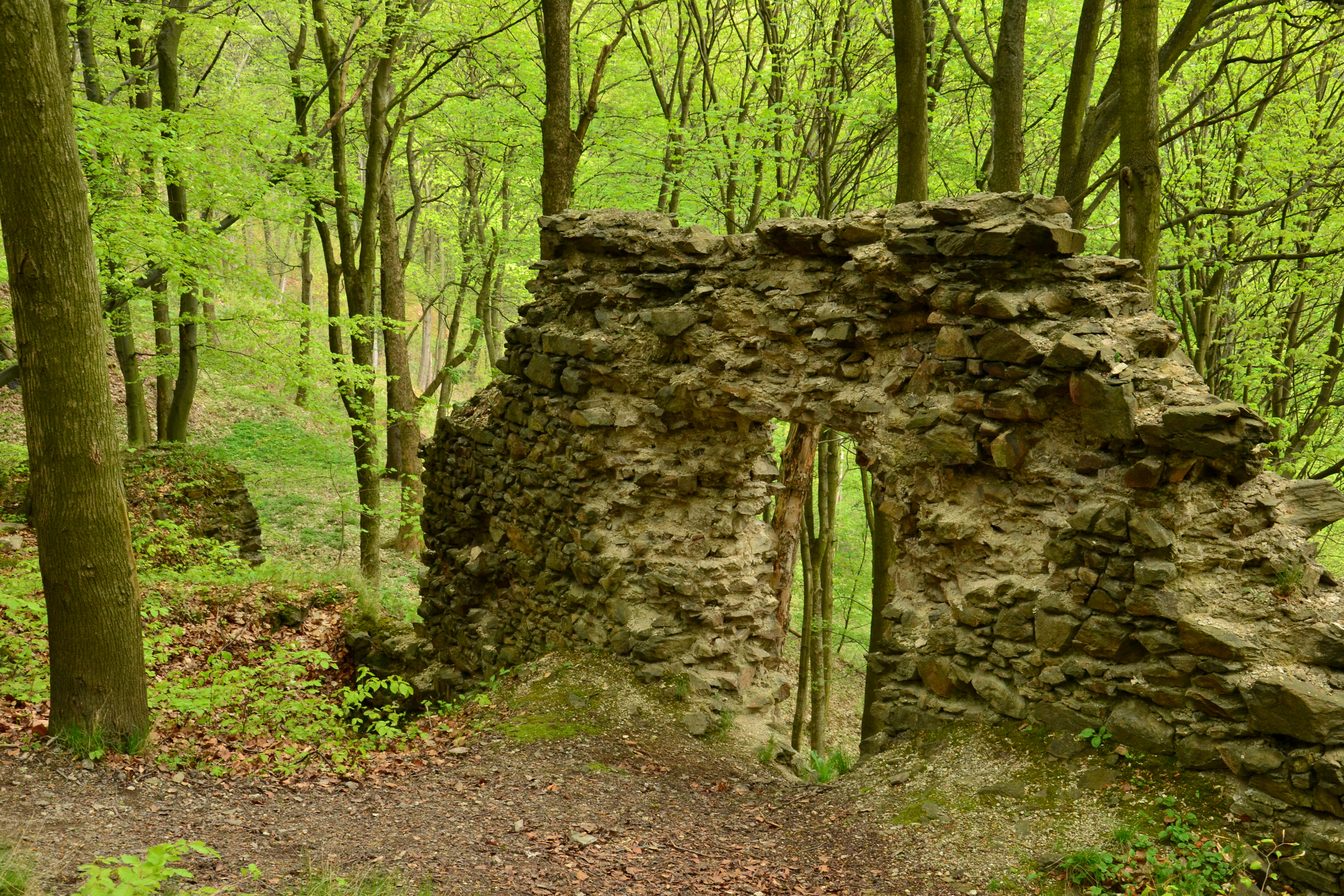 Hrad Kyšperk – vnitřní strana vnější zdi budovy v severovýchodní části hradu